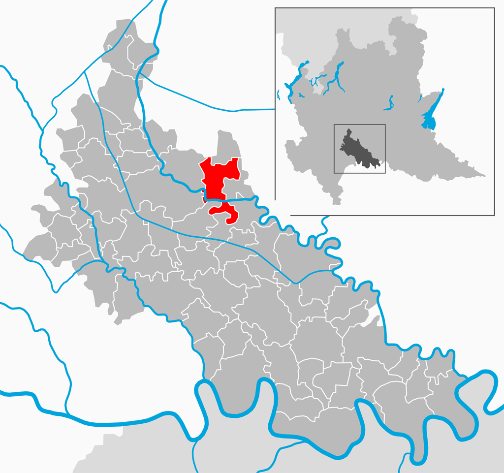 Il comune di Corte Palasio nella provincia di Lodi